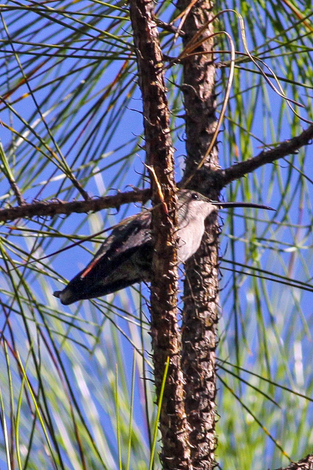 Sierra Baerucu National Park Mine Road